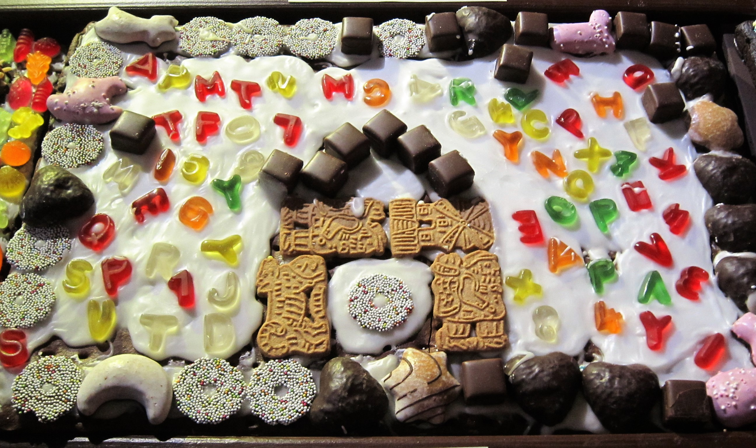 Leckereien-Collage am Knusperhaus auf dem Weihnachtsmarkt Aurich, angefertigt von Grundschülern